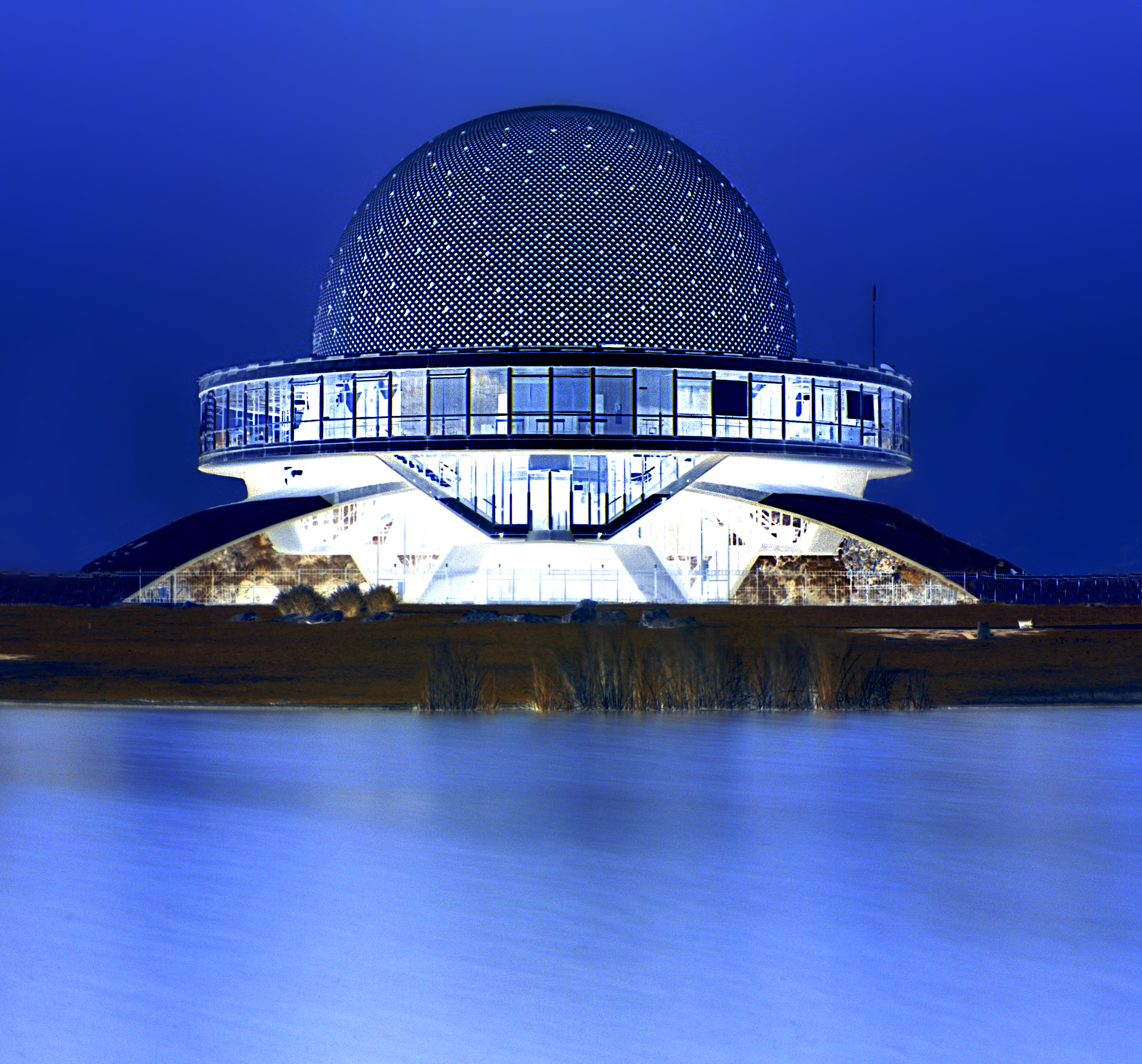 Vista nocturna del Planetario de Buenos Aires.